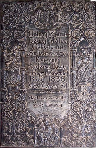 Інтэр'ер, мэмарыяльная табліца ў памяць аб жонцы аднаго з Радзівілаў Цэлестыне з роду Сулістроўскіх